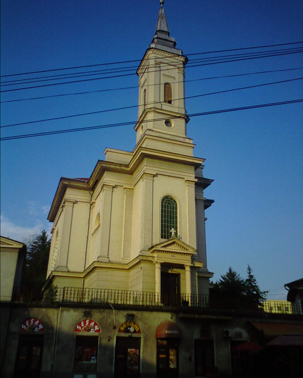 Biserica Romano-Catolică din Zalău 01